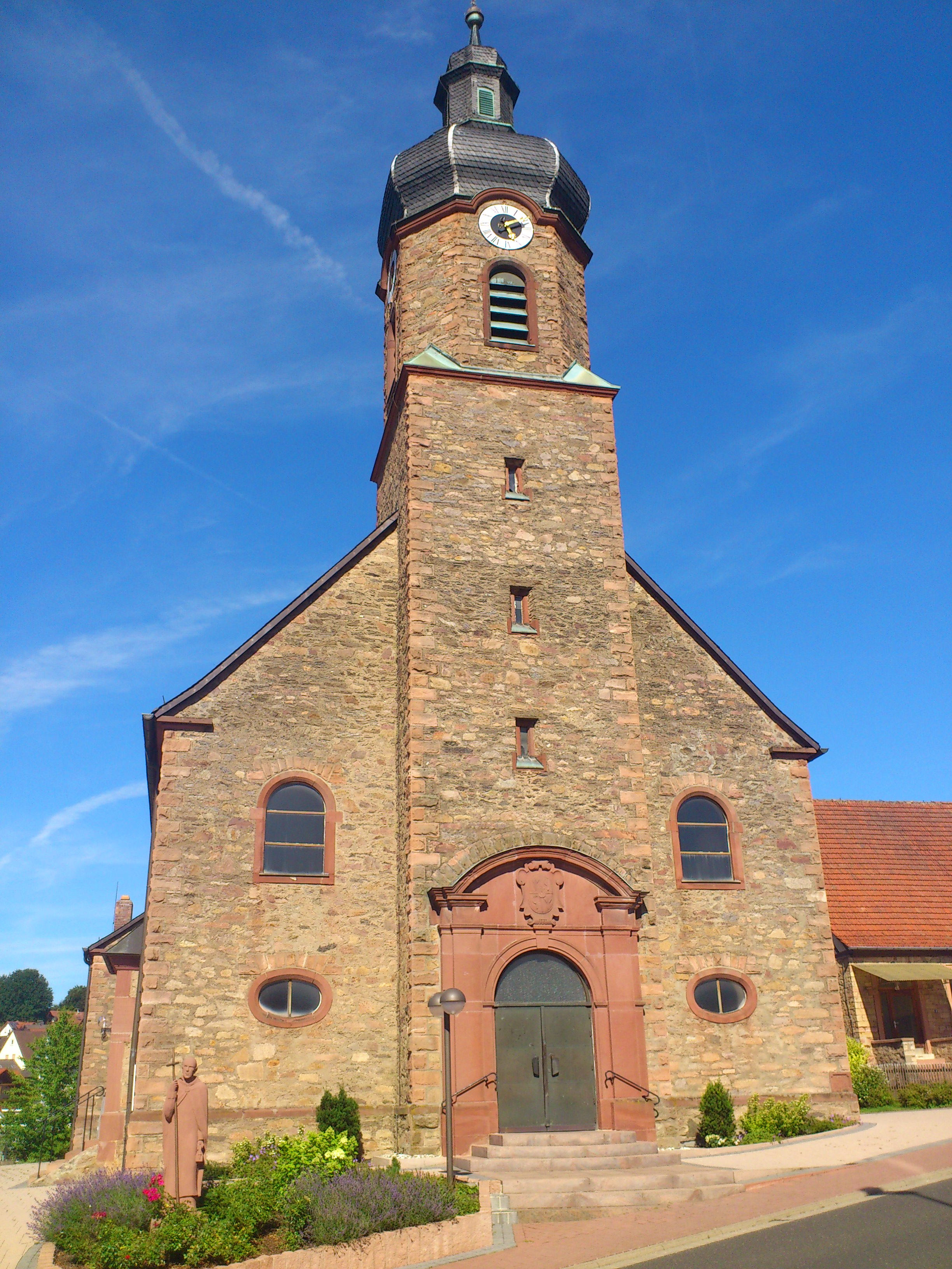 Die katholische Filialkirche St. Kilian und St. Bonifatius in Kleinblankenbach